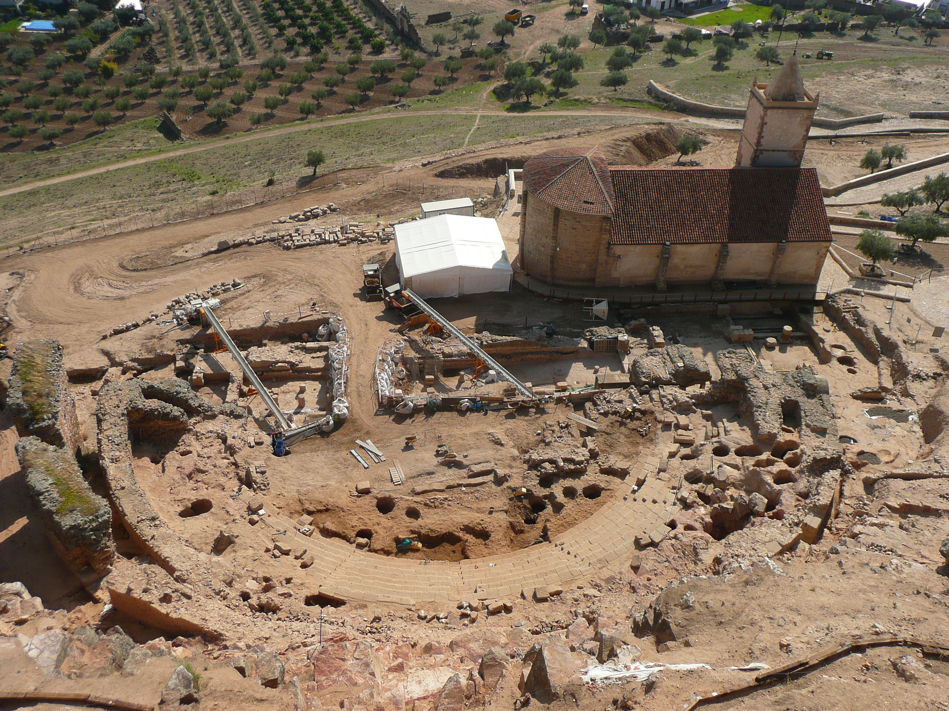 Vista de las excavaciones del teatro romano desde el Castillo.